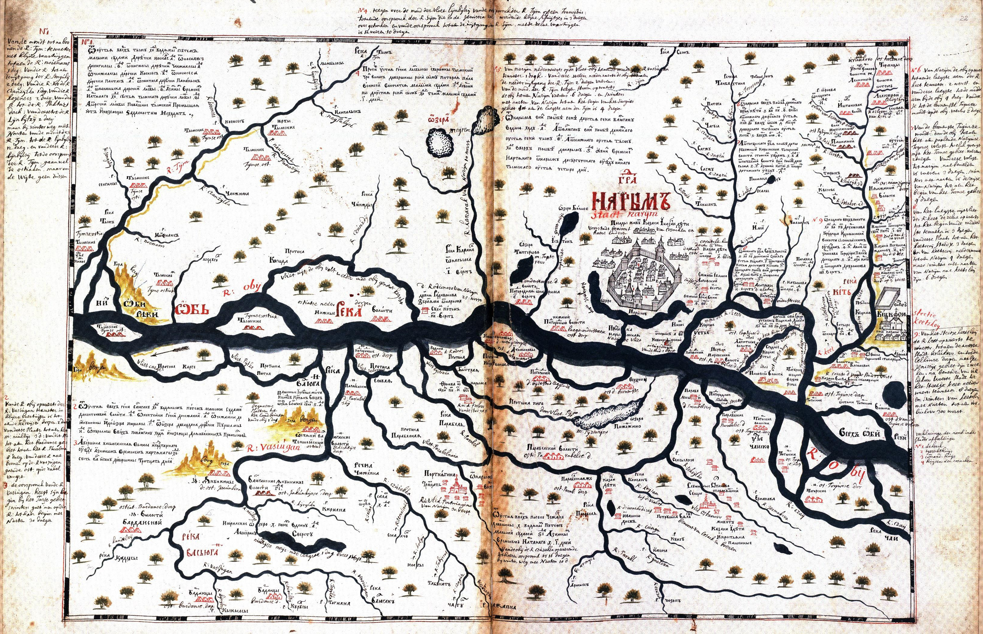 Чертёж земель Нарымского края (карта). Лист 10